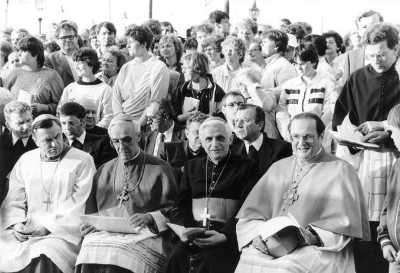 ADN-ZB/Hiekel/10.7.1987 Dresden: Katholikentreffen eröffnet Mit einem Gottesdienst an der ehrwüdigen Kathedrale wurde in Dresden das Katholikentreffen 1987 offiziell eröffnet. V.r.n.l.: Joachim Kardinal Meisner, Bischof von Berlin und Vorsitzender der Berliner Bischofskonferenz, Kardinal Ratzinger aus Rom, Bischof Gerhard Schaffran des Bistums Dresden-Meißen, Bischof [Karl] Lehmann, Stellvertretender Vorsitzender der Deutschen Bischofskonferenz.